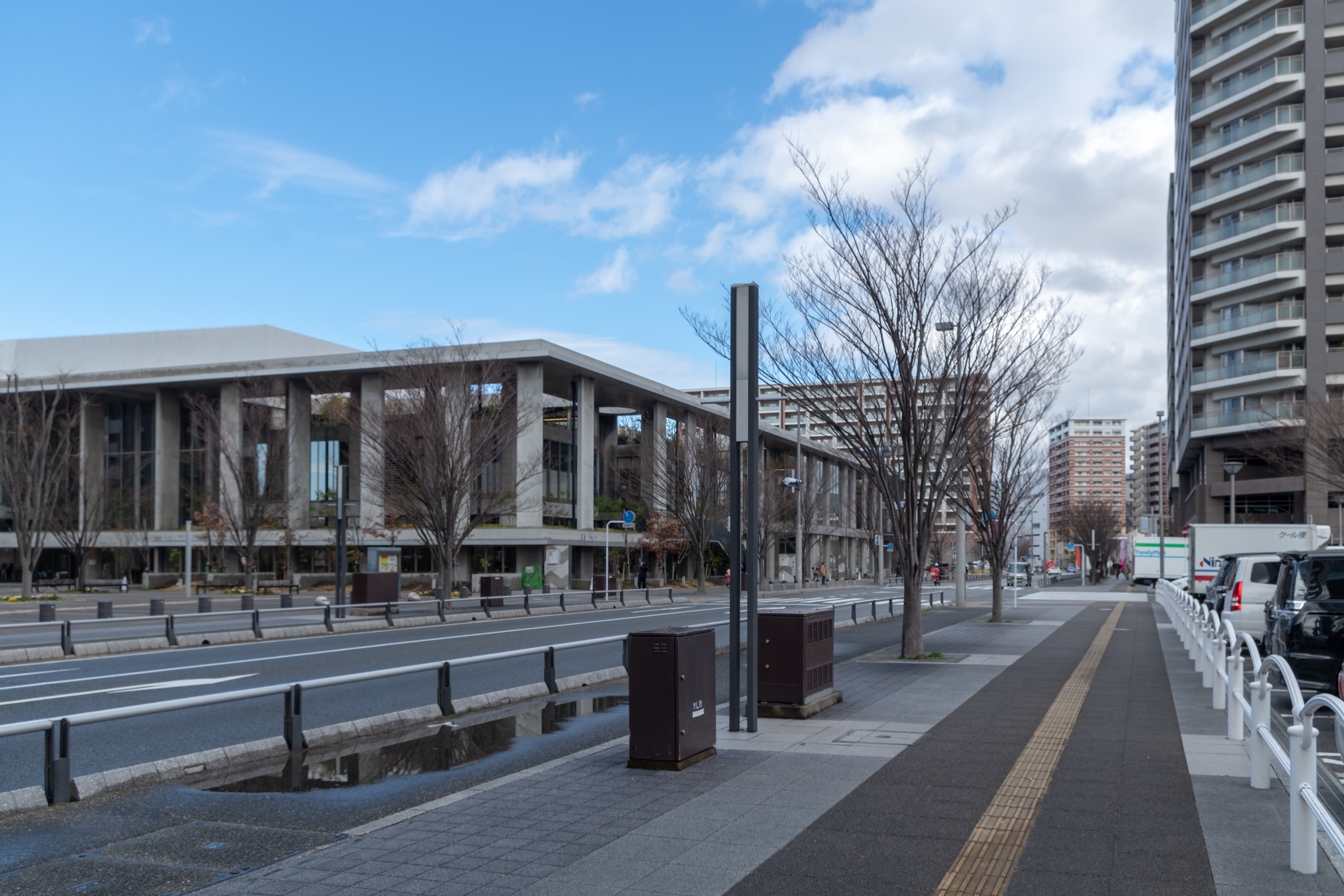 千早駅西口